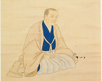 名古屋生まれの国学者、本居内遠（もとおりうちとお、1792年-1855年）。本居大平の弟子。紀州徳川家に仕える。